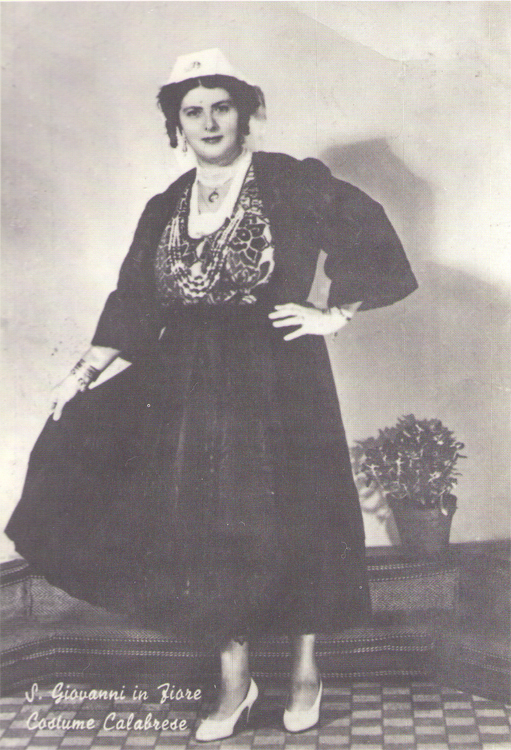 Pacchiana con il "Rituartu" costume tipico di San Giovanni in Fiore